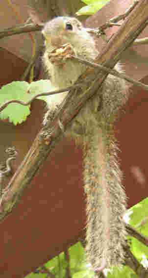 Heliosciurus (vermutlich gambianus), Guinea, Juni 2003